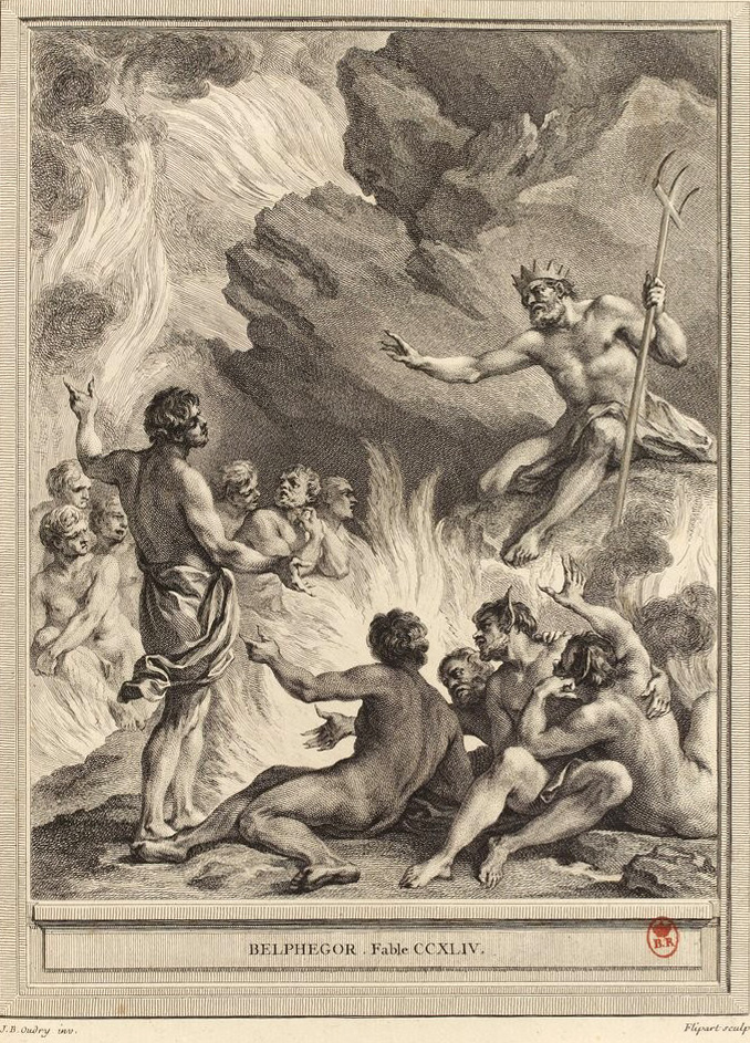 Gravure réalisée par Jean-Jacques Flipart d'après un dessin de Jean-Baptiste Oudry représentant la fable Belphégor de Jean de La Fontaine (fable 27 du livre XII). Cette gravure est parue dans l'édition complète des fables de La Fontaine, parue en quatre tomes chez l'éditeur Desaint & Saillant, rue saint Jean de Beauvais à Paris, 1755-1759.